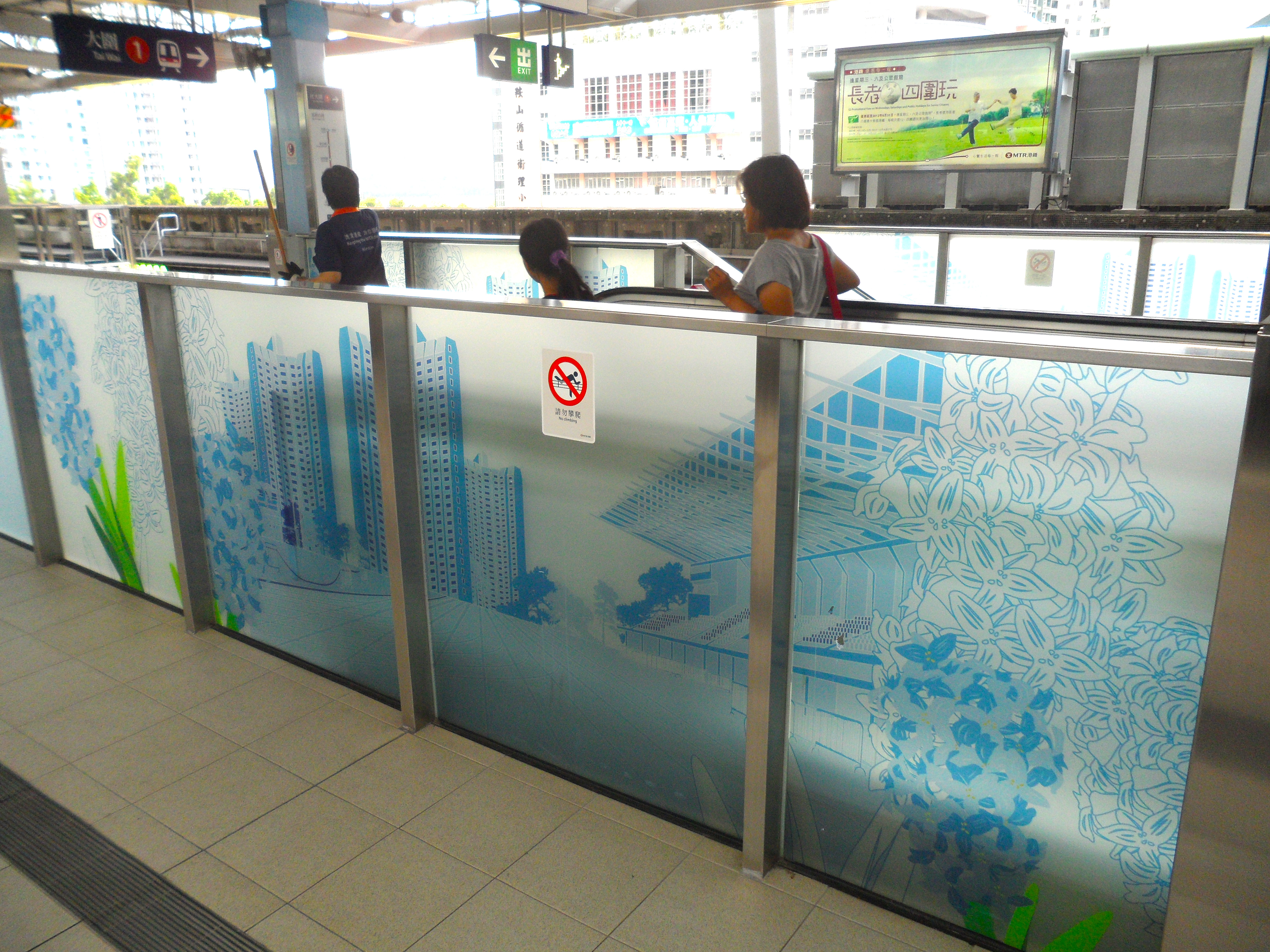 港鐵恆安站月台佈置